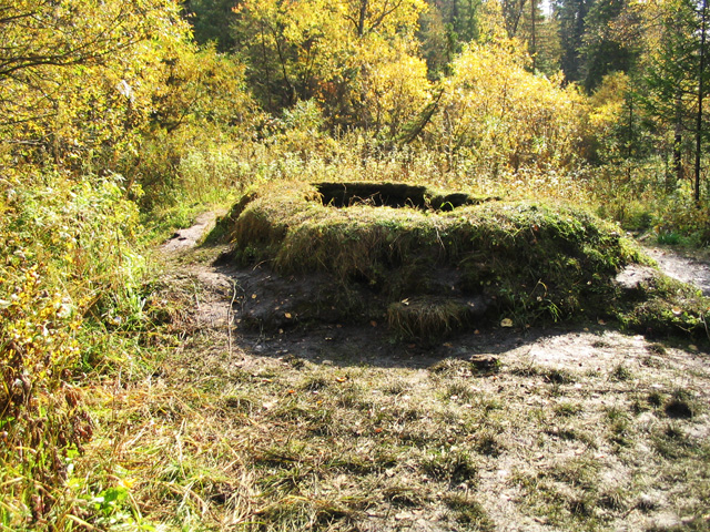 Главная Таловская чаша - государственный памятник природы в Томской области This image is related to the protected area of Russia number 7010302